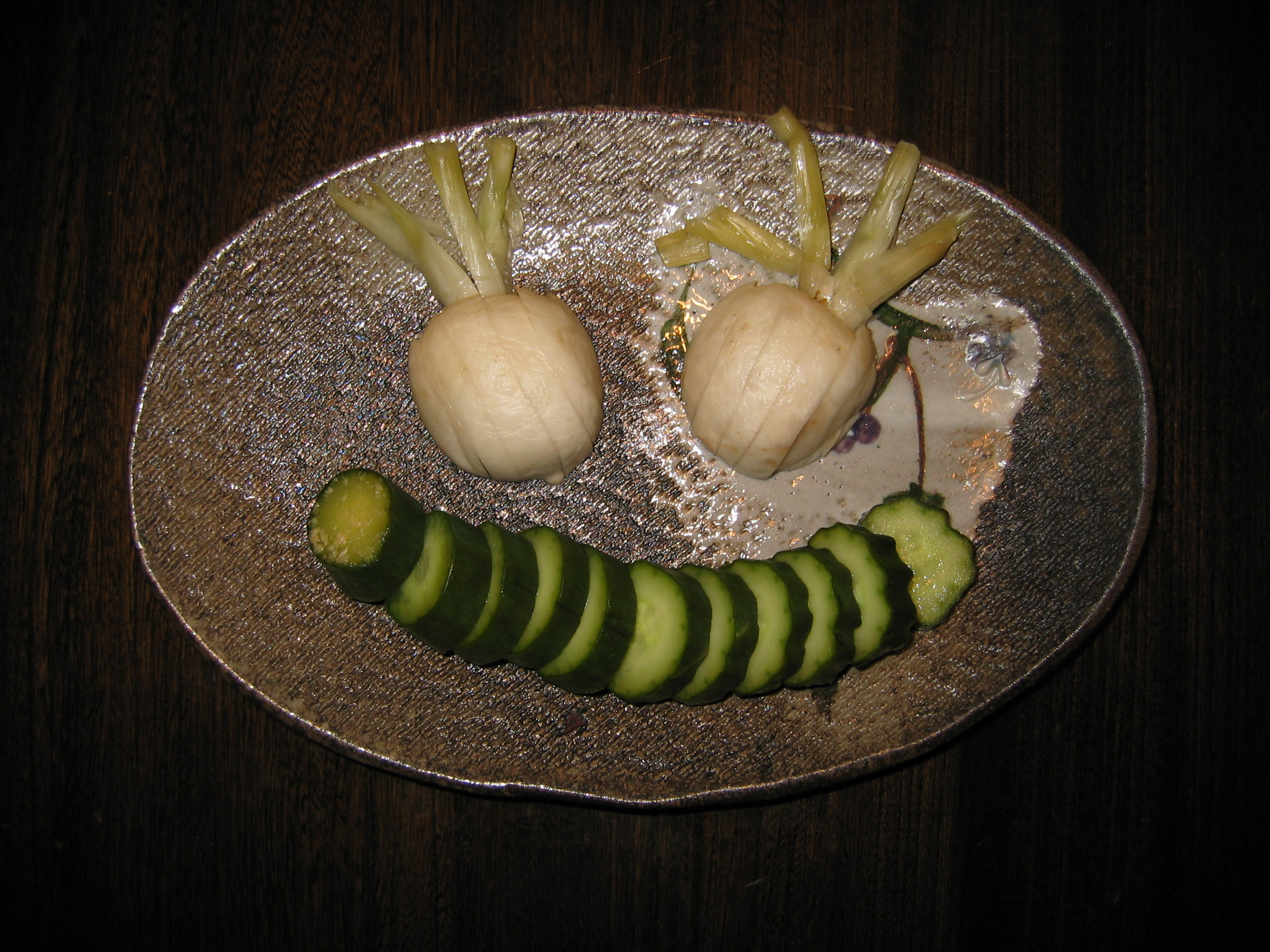 Nukaduke - Japanese pickles - my wife made makes me smile.